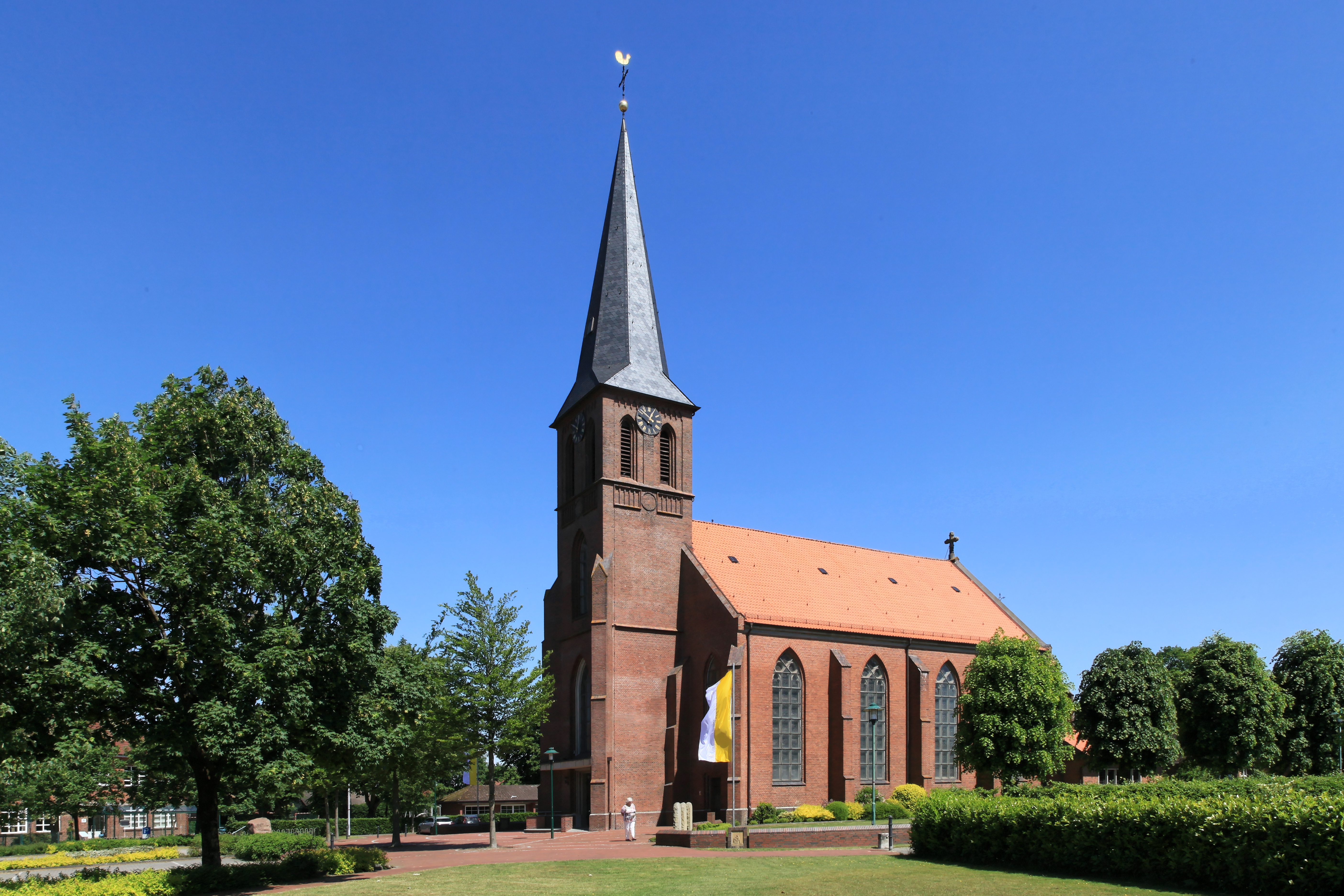 St. Peter und Paul am Kolpingplatz in Scharrel, Saterland